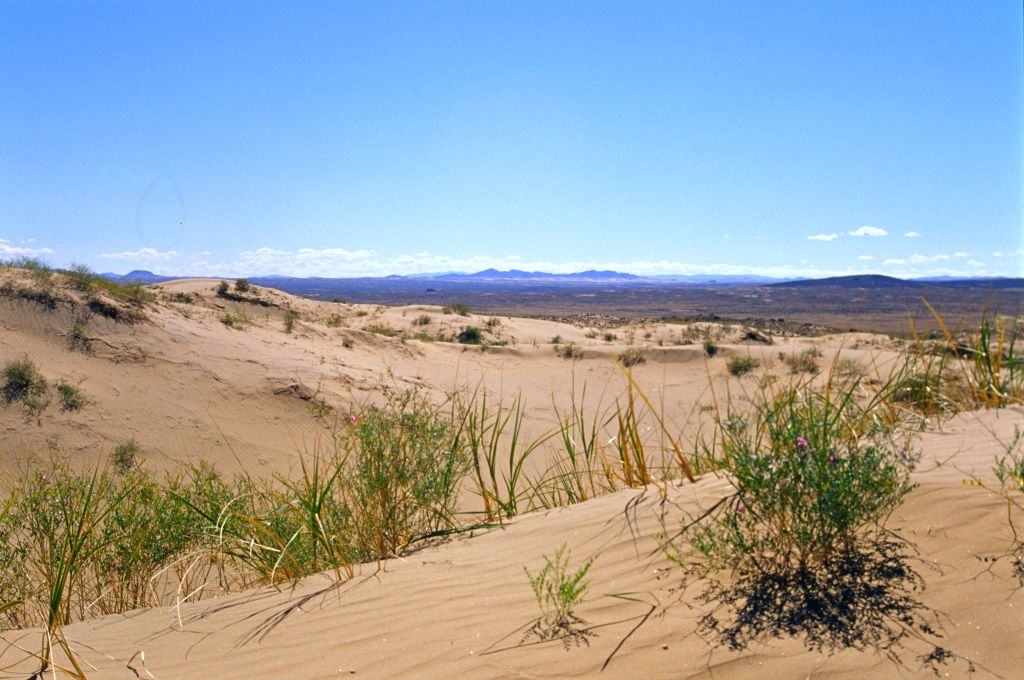 Убсунурская Котловина, государственный природный биосферный заповедник, This image is related to the protected area of Russia number 1700025